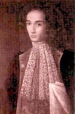 портрет Алессандро Скарлатти Размер